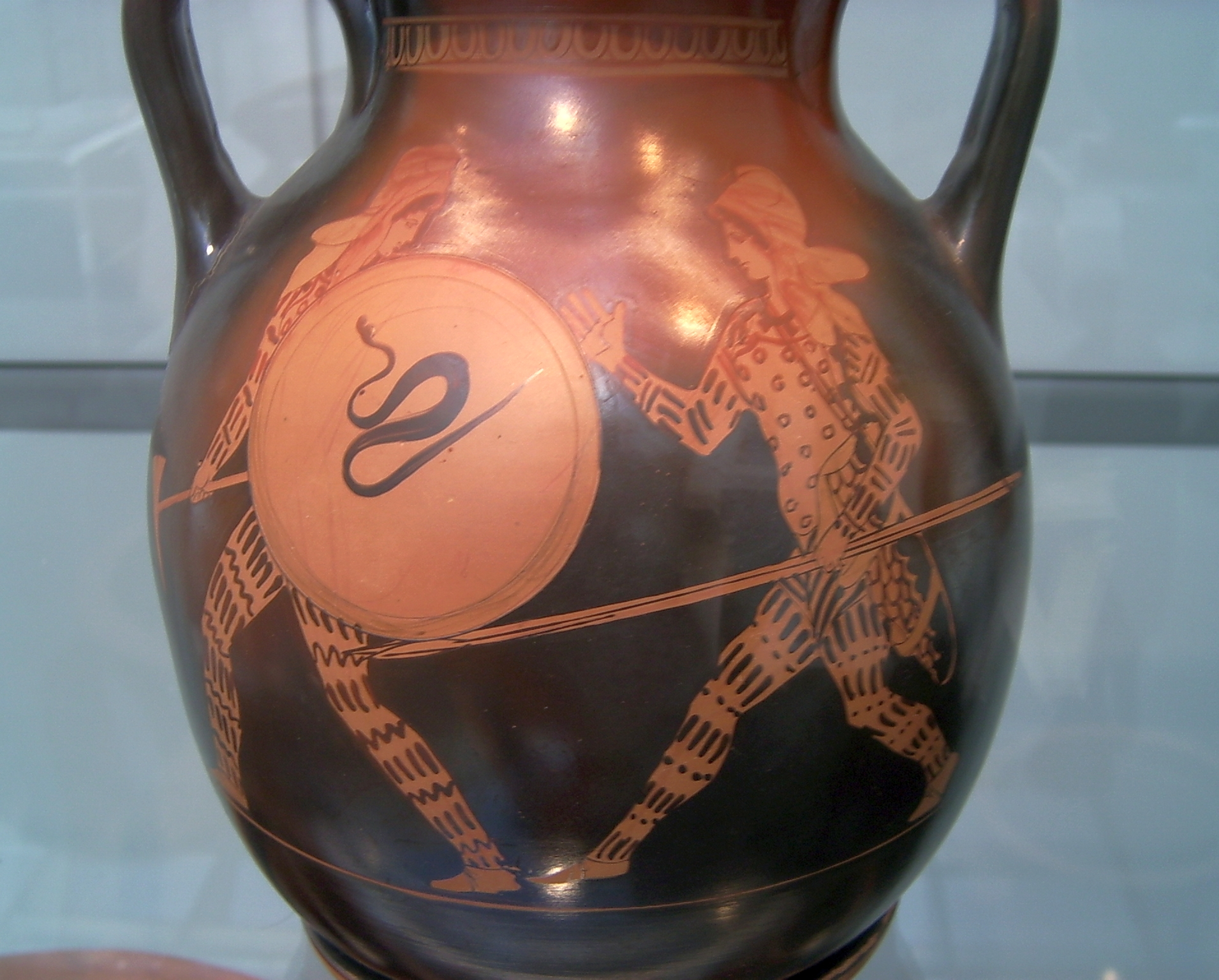 Zwei laufende, bewaffnete Amazonen in orientalischer Tracht auf der Vorderseite und einem Manteljüngling auf der Rückseite einer Pelike des Malers der Bostoner Phiale, Um 440/35 v. Chr., gefunden in Unteritalien, Höhe 34 cm, Staatliche Antikensammlungen, Inventarnummer 2351